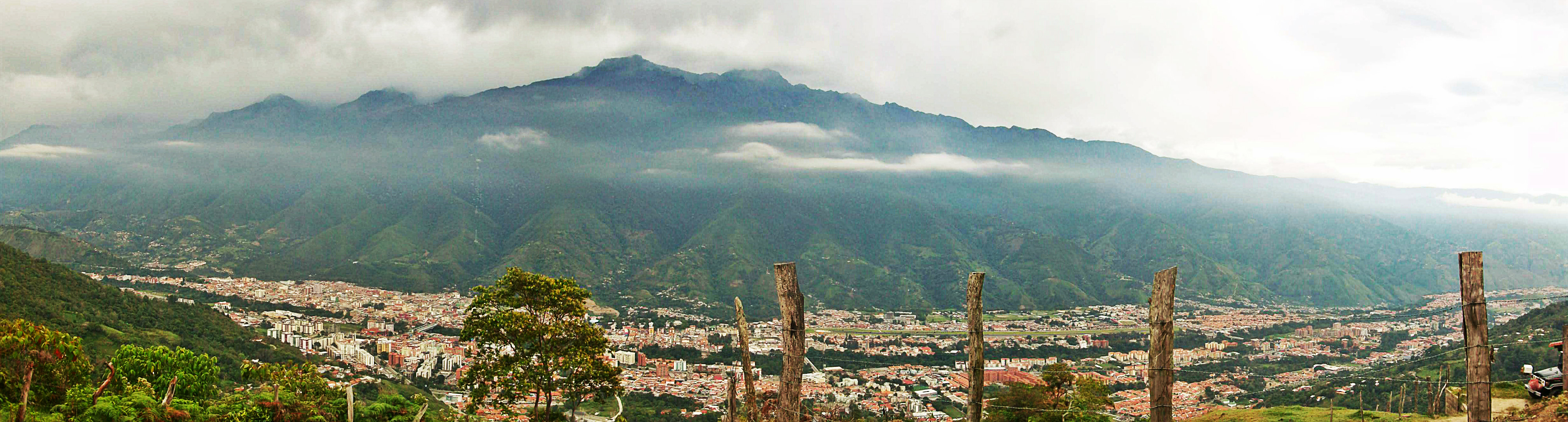 Vista panoramica desde la sierra norte (La Culata)